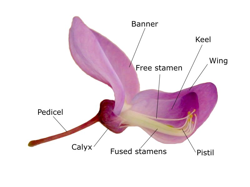 Add labels